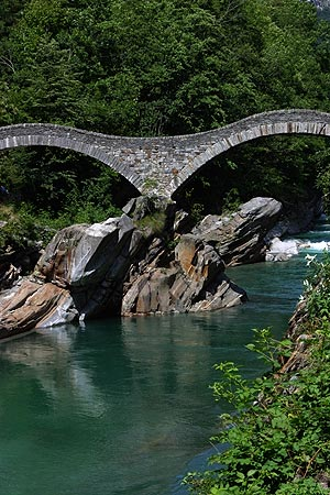 Ponte die Salti in Lavertezzo